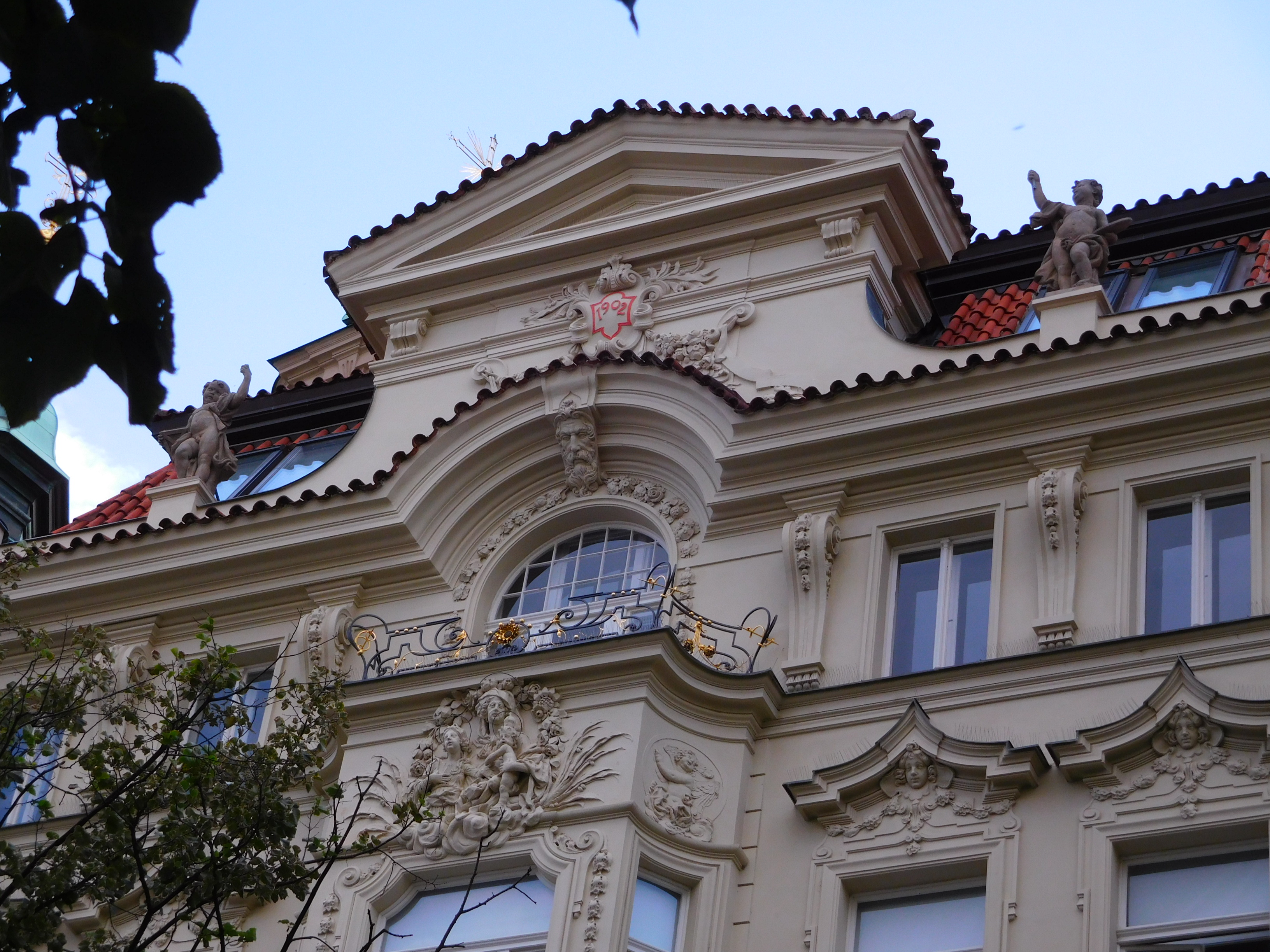 Praha - Staré Město, Pařížská 1, balkón a štít